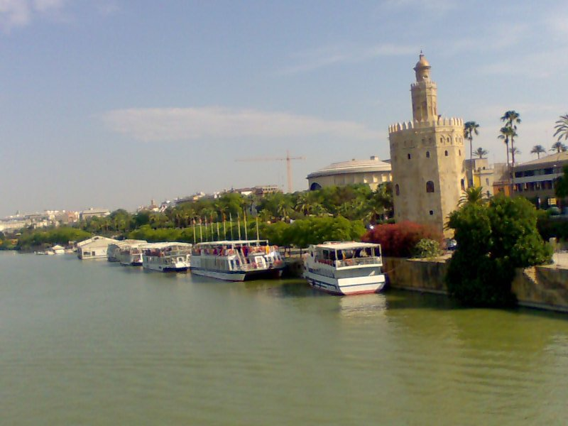 Barcos de cruceros por el río Guadalquivir en Sevilla